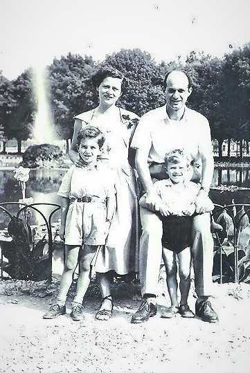 Lanfranco Caretti a Firenze con la moglie Vittorina e due dei suoi tre figli, Paolo e Stefano.